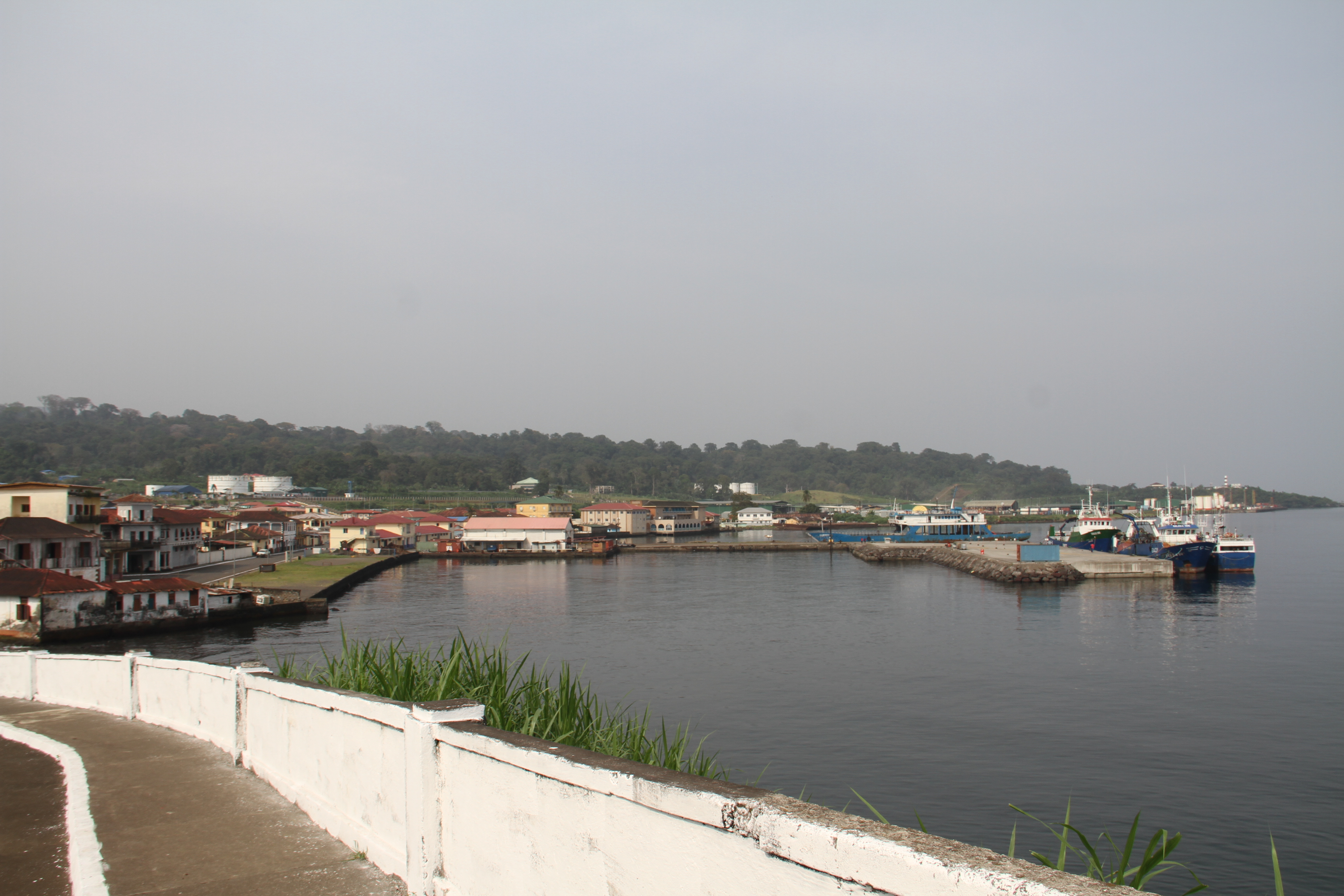 Ansicht des Hafens von Luba The making of this document was supported by the Community-Budget of Wikimedia Germany.